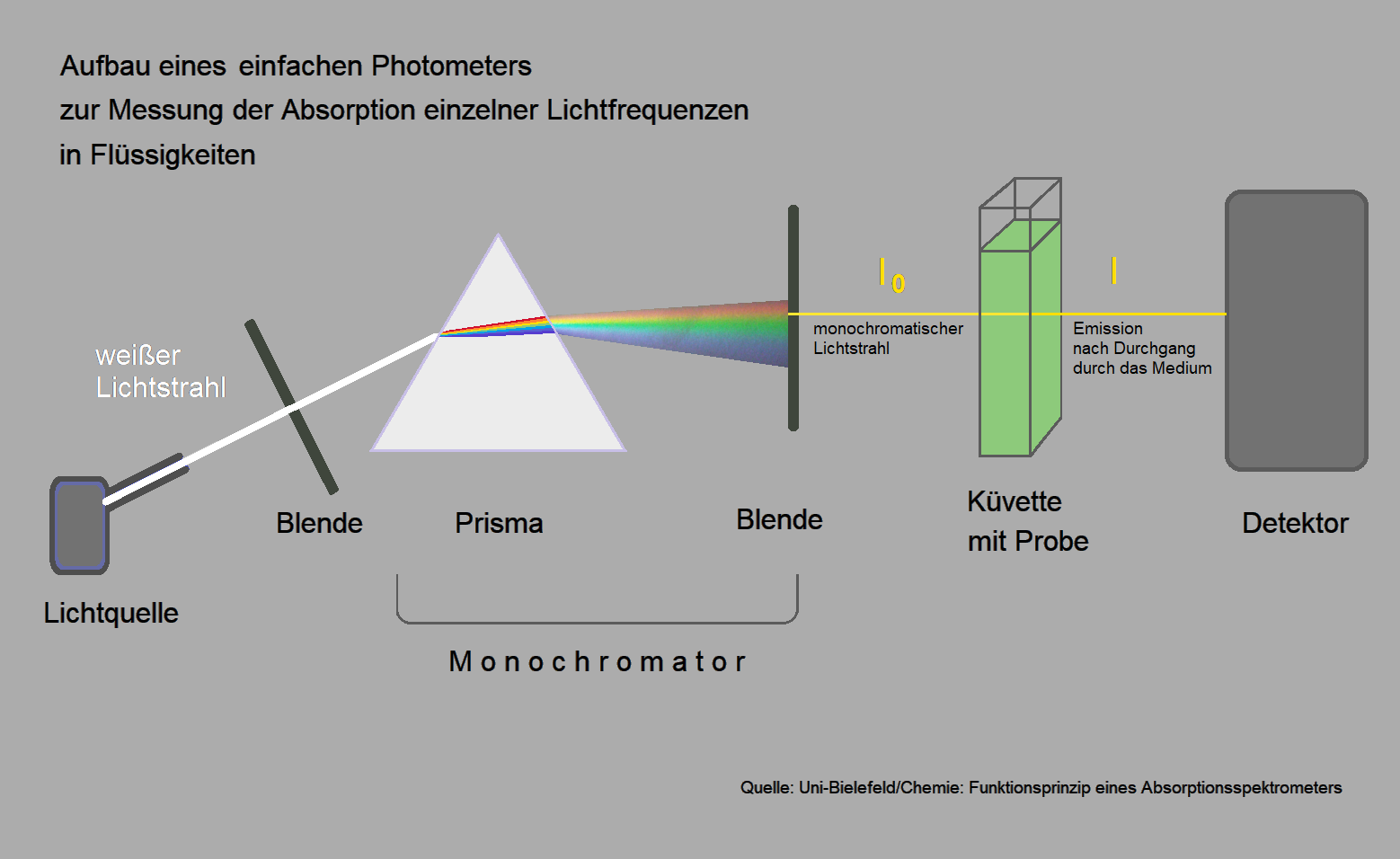 Funktionsprinzip eines Absorptionsspektrometers